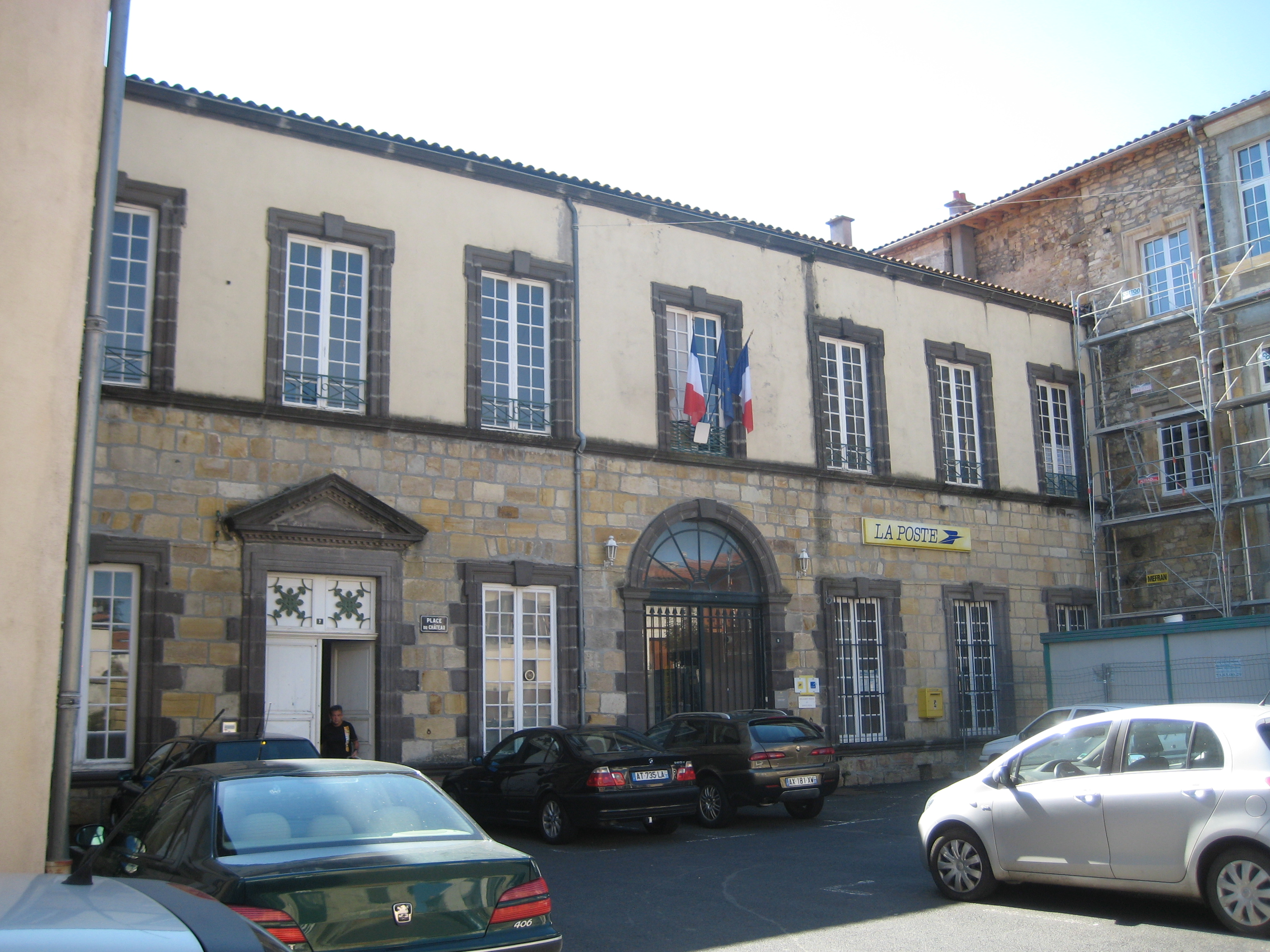 Mairie de Plauzat